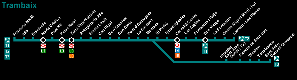 Imagen diseñada por mí de la línea T1 T2 T3 del Trambaix